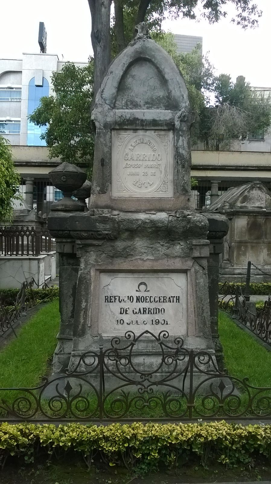 Detalles de tumba en el museo panteón de San Fernando